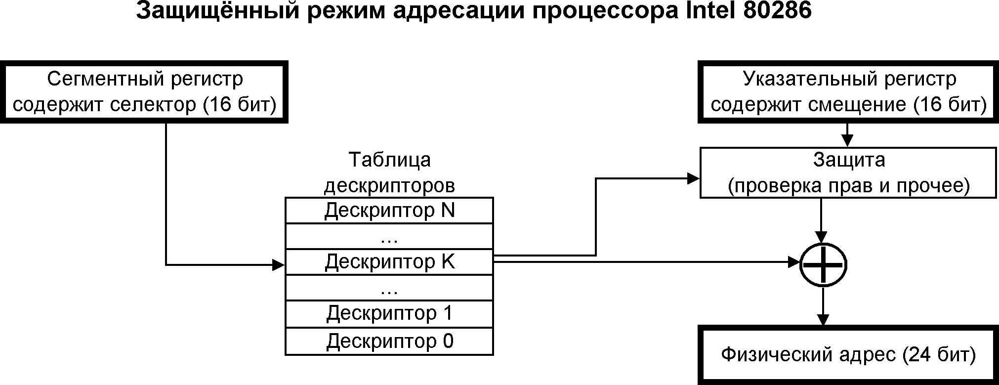 Защищённый режим адресации процессора Intel 80286 Упрощённая схема показывающая принцип адресации в защещённом режиме процессора Intel 80286